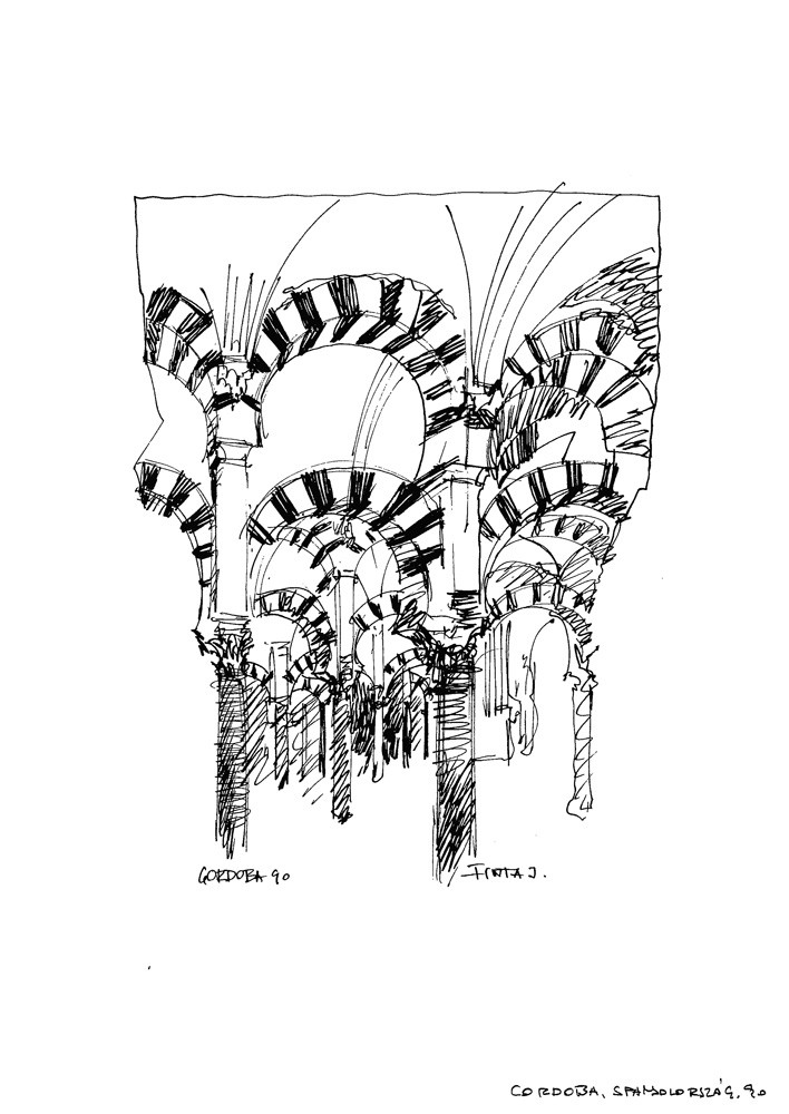 A córdobai nagymecset belülről, Spanyolország (útirajz)